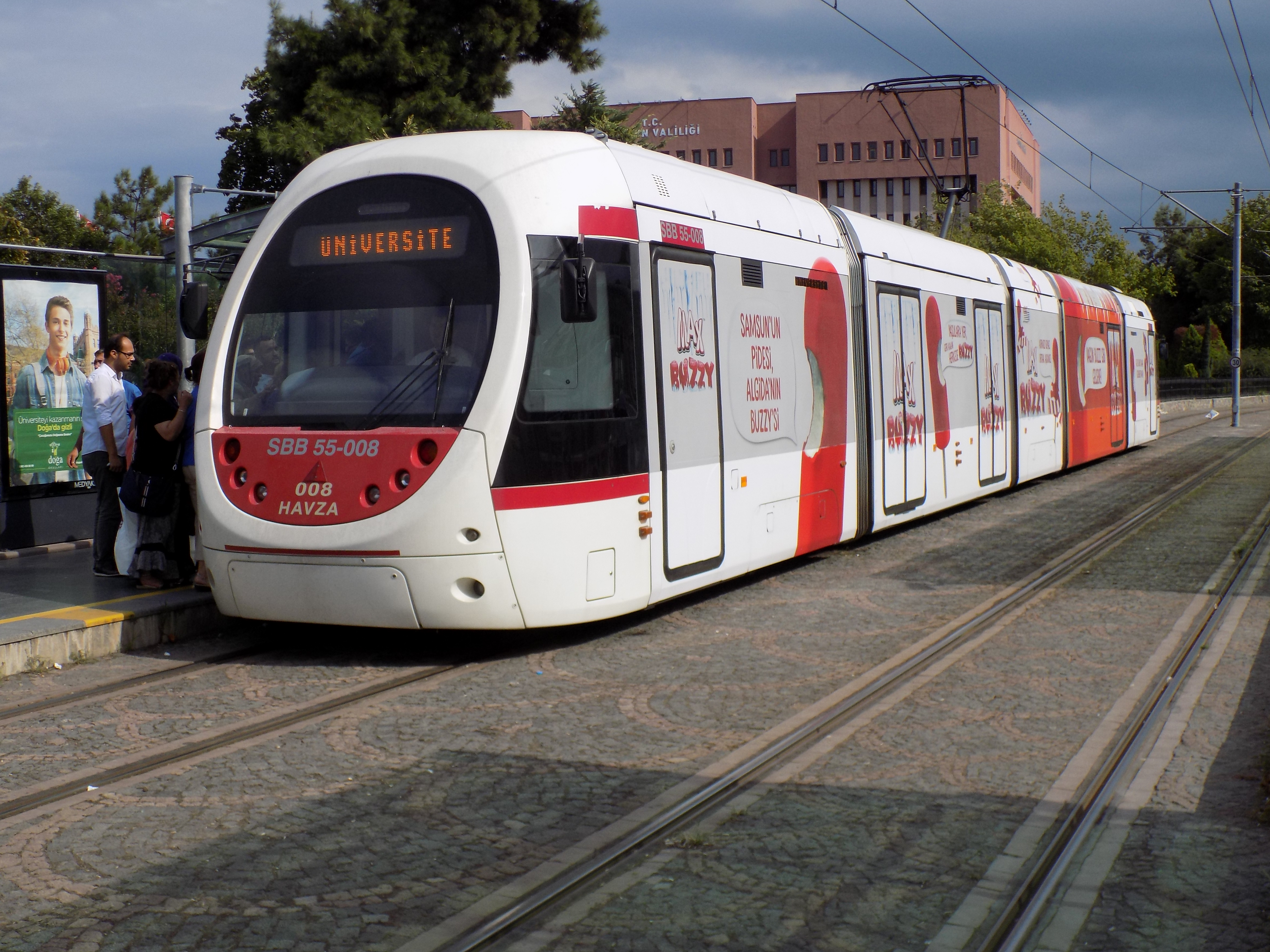 AnsaldoBreda Sirio in Samsun.